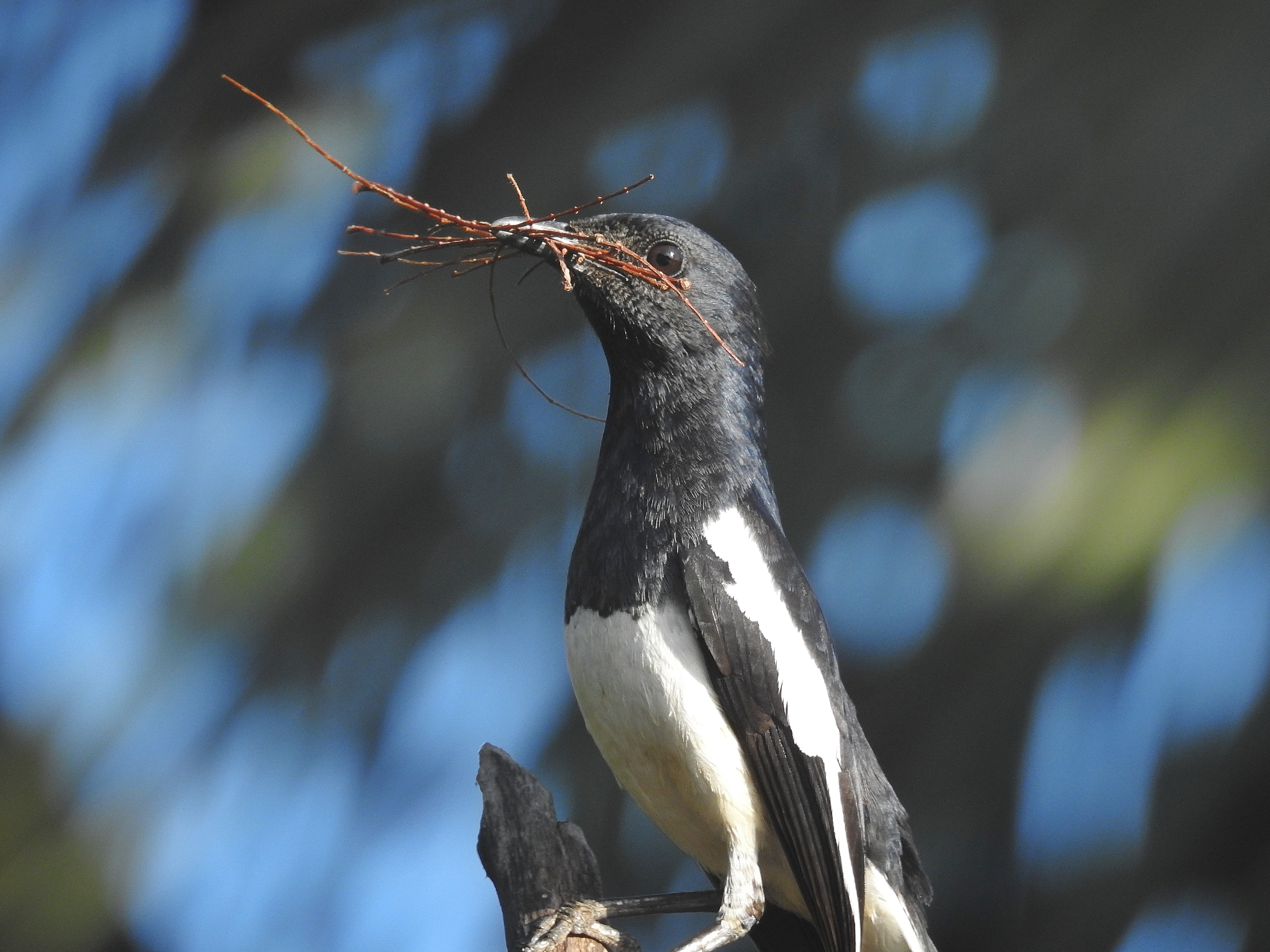 From kannur kerala